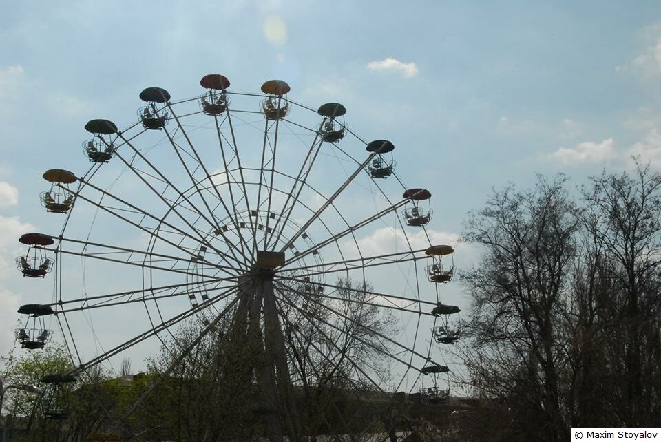 Парк Горького